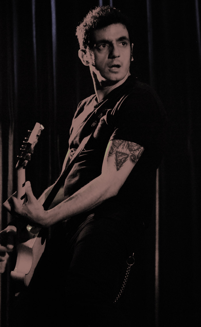 Hugo Díaz, guitarrista de la banda uruguaya Trotsky Vengarán.